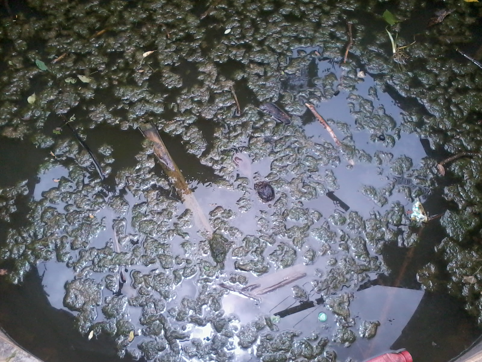 കൊക്കക്കോള ഫാക്ടറിയുടെ പ്രവർത്തനത്തെതുടർന്ന് ഉപയോഗശൂന്യമായി കിടക്കുന്ന പൊതുകിണർ.